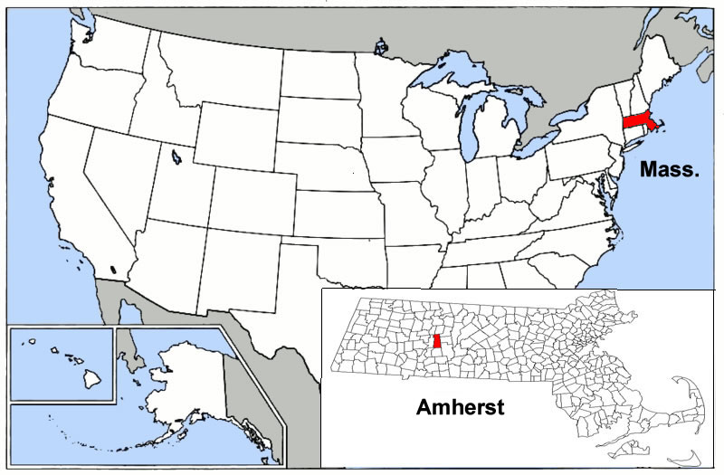 El estado de Massachusetts con la ubicación de Amherst. A big US map with Mass. highlighted, with a map of the State in the lower-right with Amherst highlighted.